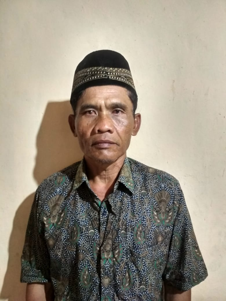 bayan 2 wonorejo